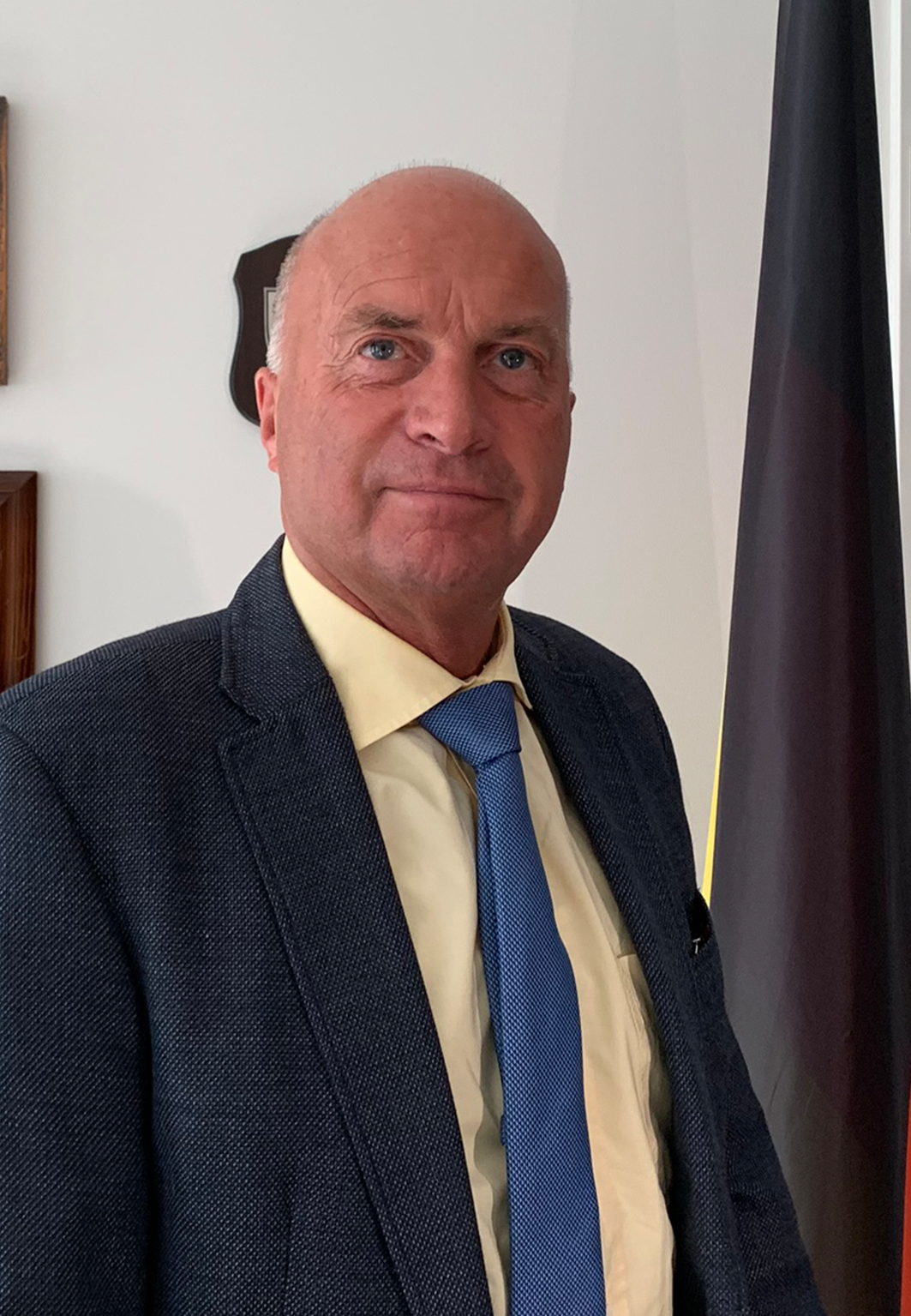 Rüdiger Lucassen im Interview mit dem Podcast zur Berateraffäre